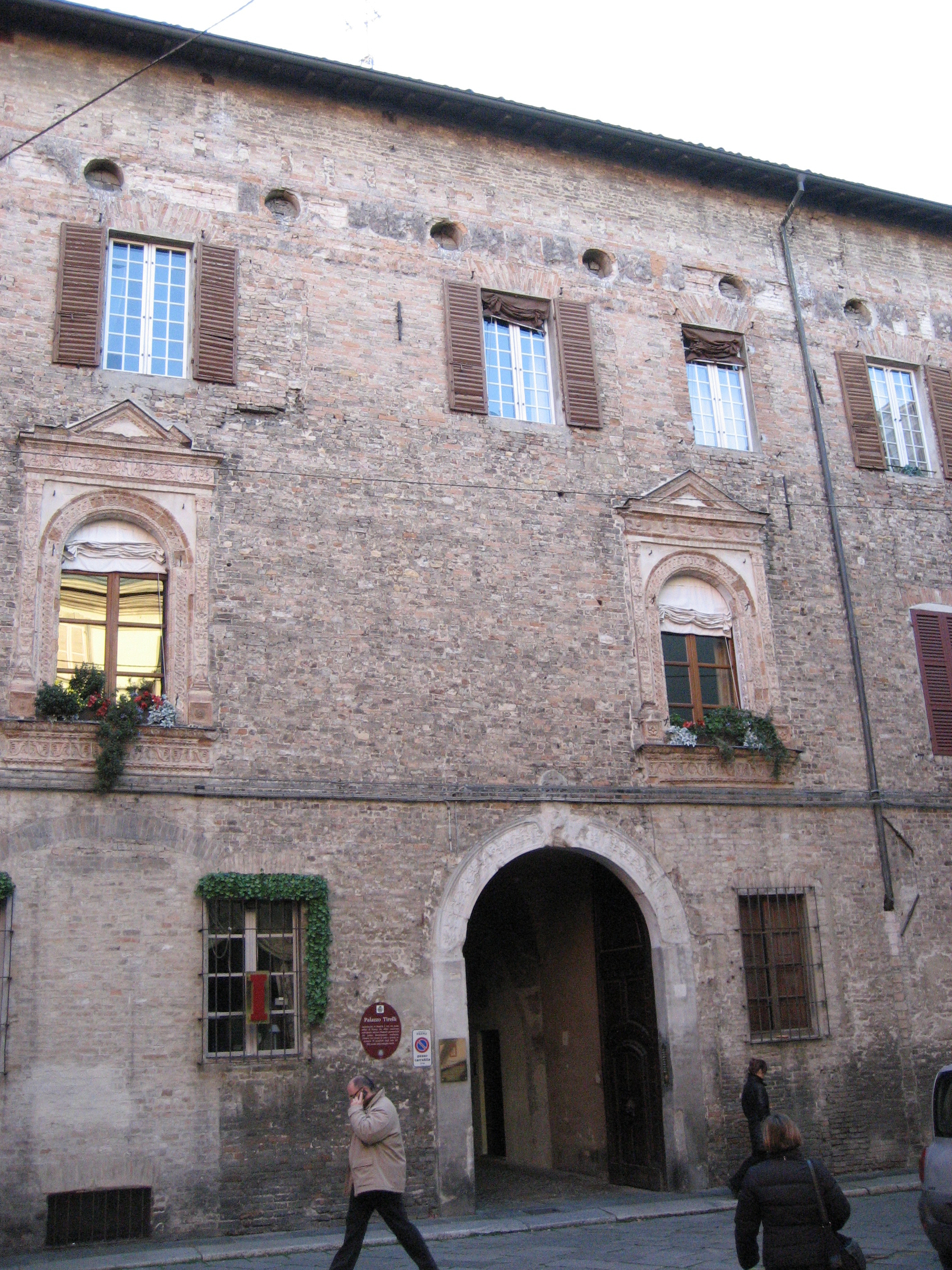 Palazzo Tirelli in Parma (Italia)